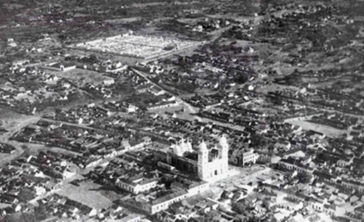 Mapa aereo casco central Maracaibo